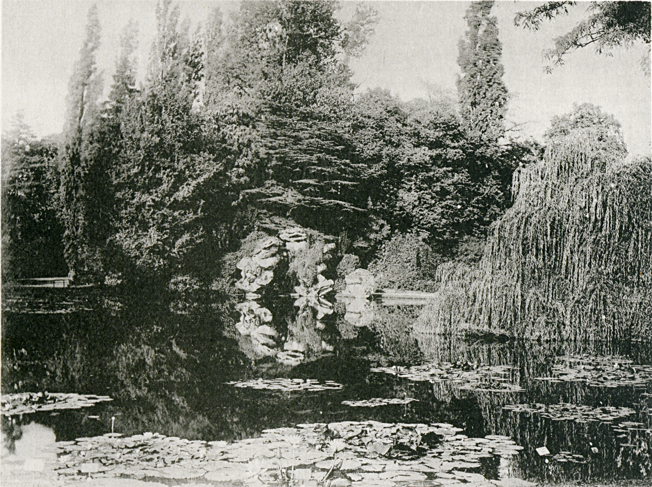 Garden craft in Europe. London 1913. Plate facins page 306. Bagatelle rocks by H.N. King (of Hammersmith)